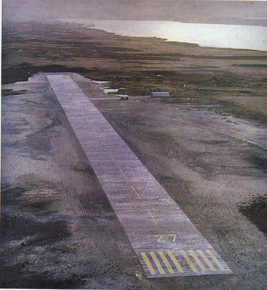 VUELO INAUGURAL A LAS ISLAS MALVINAS CON FOKKER F-27 El 15 de noviembre de 1972, el Fokker F-27 matrícula T-43, aterriza en la pista de planchas de aluminio construida en la zona de cabo San Felipe por la Fuerza Aérea Argentina, a través del Grupo I de Construcciones. Con este vuelo se incorpora la escala Puerto Stanley (Puerto Argentino) y se implanta el servicio LD 200/1 Comodoro Rivadavia-Malvinas y regreso, con una frecuencia semanal, en Fokker F-27. LADE se hace cargo de la administración y los vuelos.